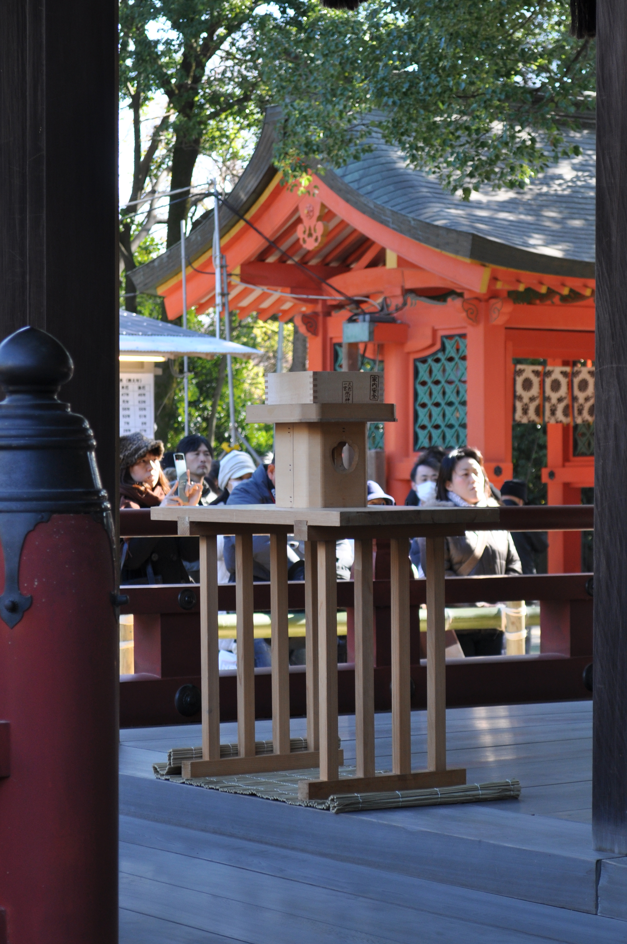 氷川神社の節分祭で使われた案（八足案）